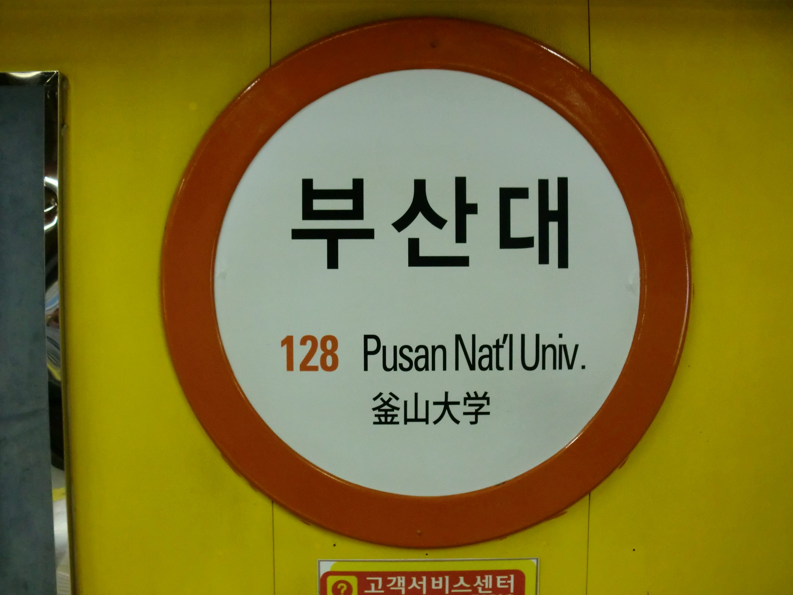 부산도시철도 1호선 부산대역